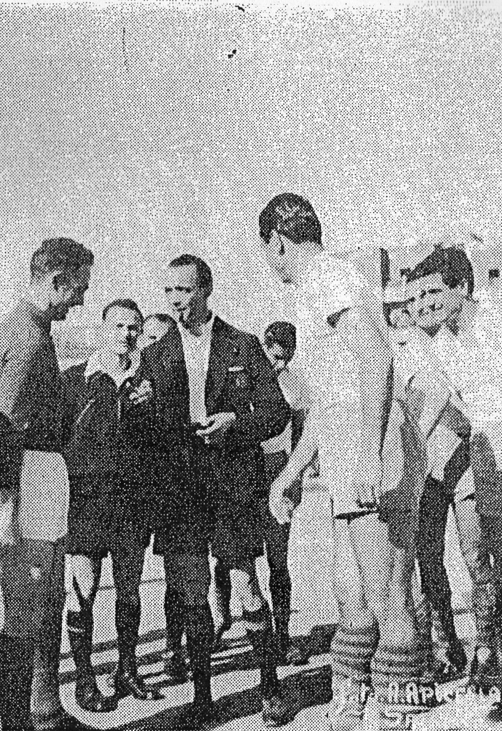 Serie A 1947-1948, incontro tra Salernitana e Triestina del 7 marzo 1948 fonte